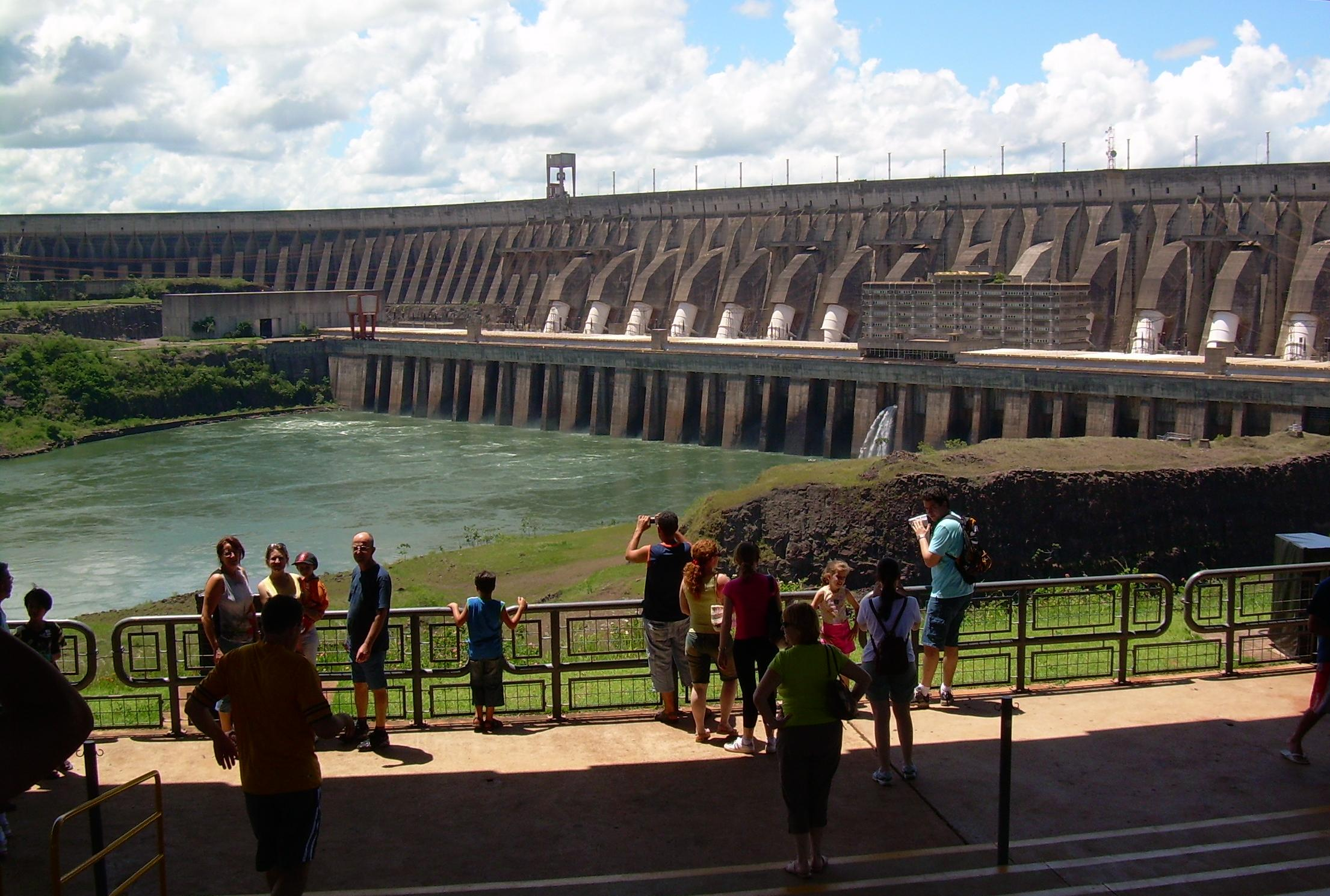 Itaipu